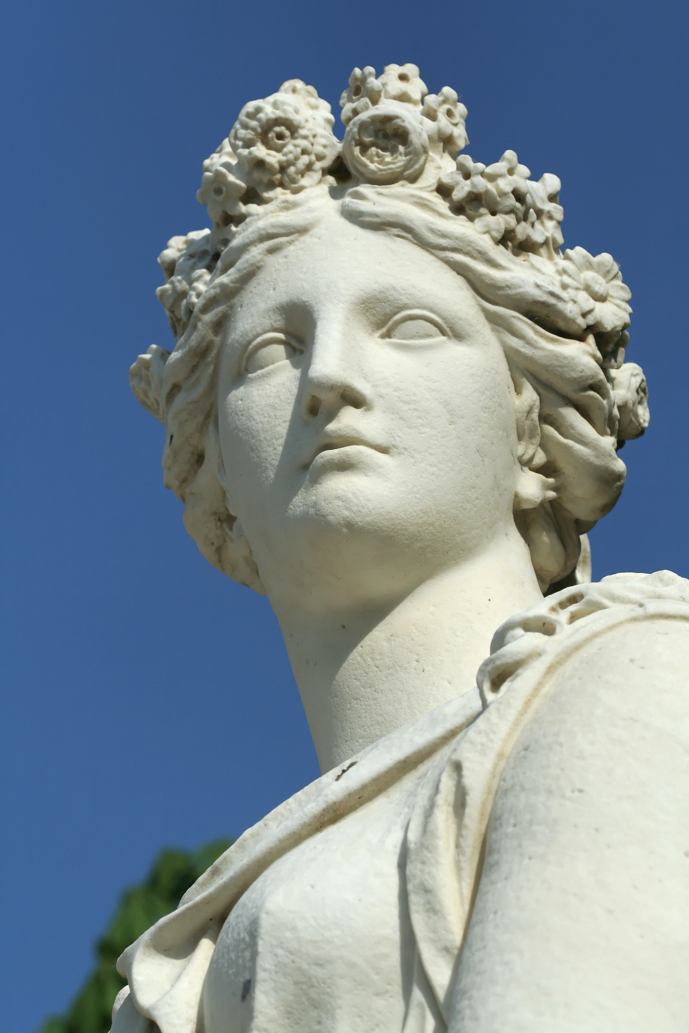 Parc de Versailles, demi-lune du bassin du Char-d'Apollon. Flore ou le Printemps, couronnée de fleurs, portant des fleurs en guirlande et couronne passée autour de son bras gauche, Marc Arcis et Simon Mazière, 1688, h. 2,20 m, marbre. inv1850n°9140